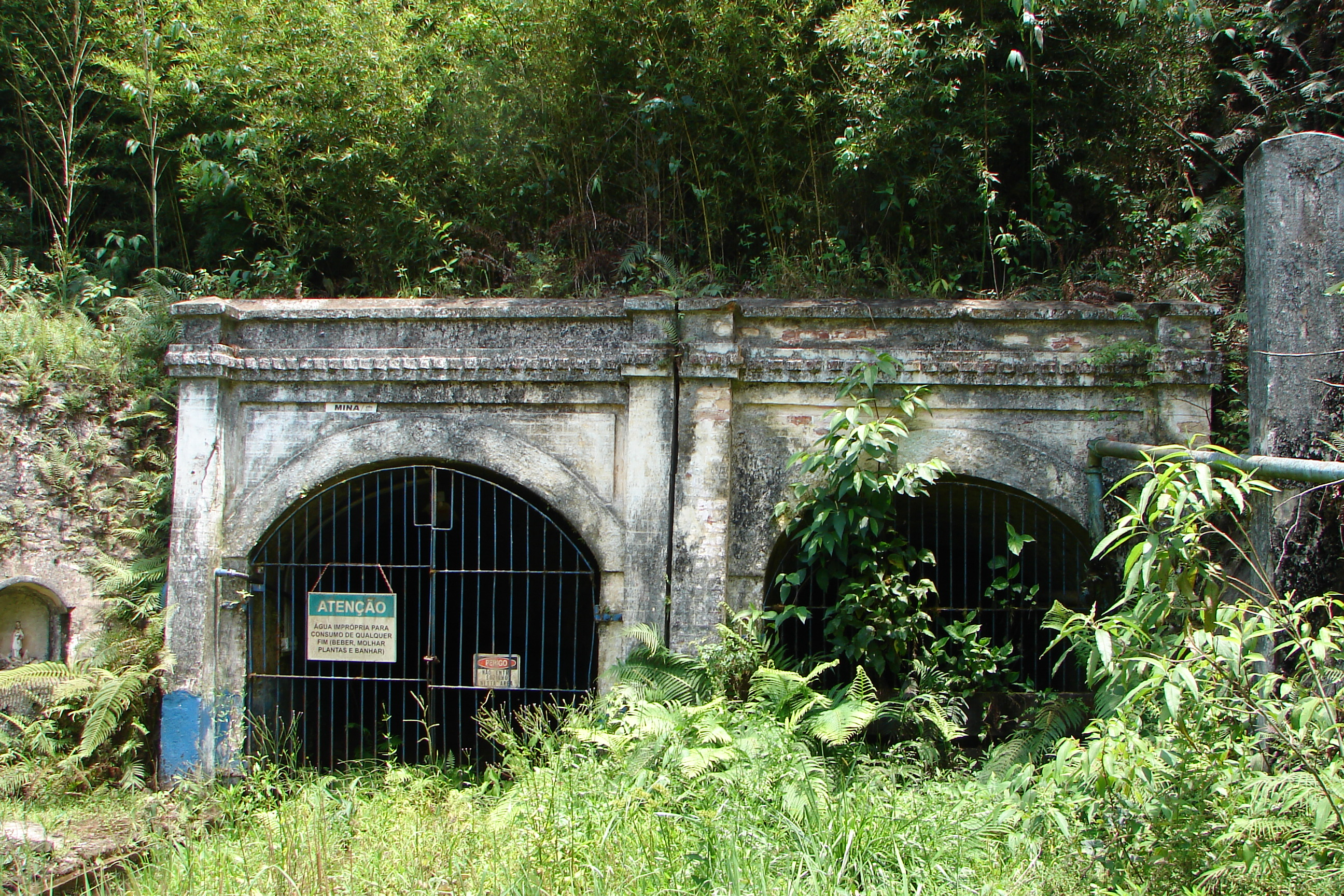 Mina de morro velho de raposos